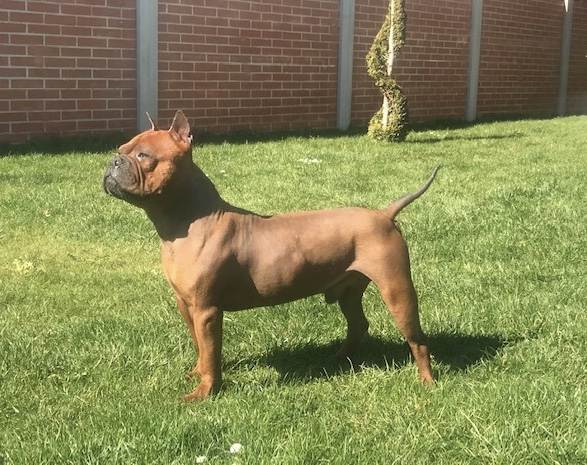 Chinese Chongqing Dog